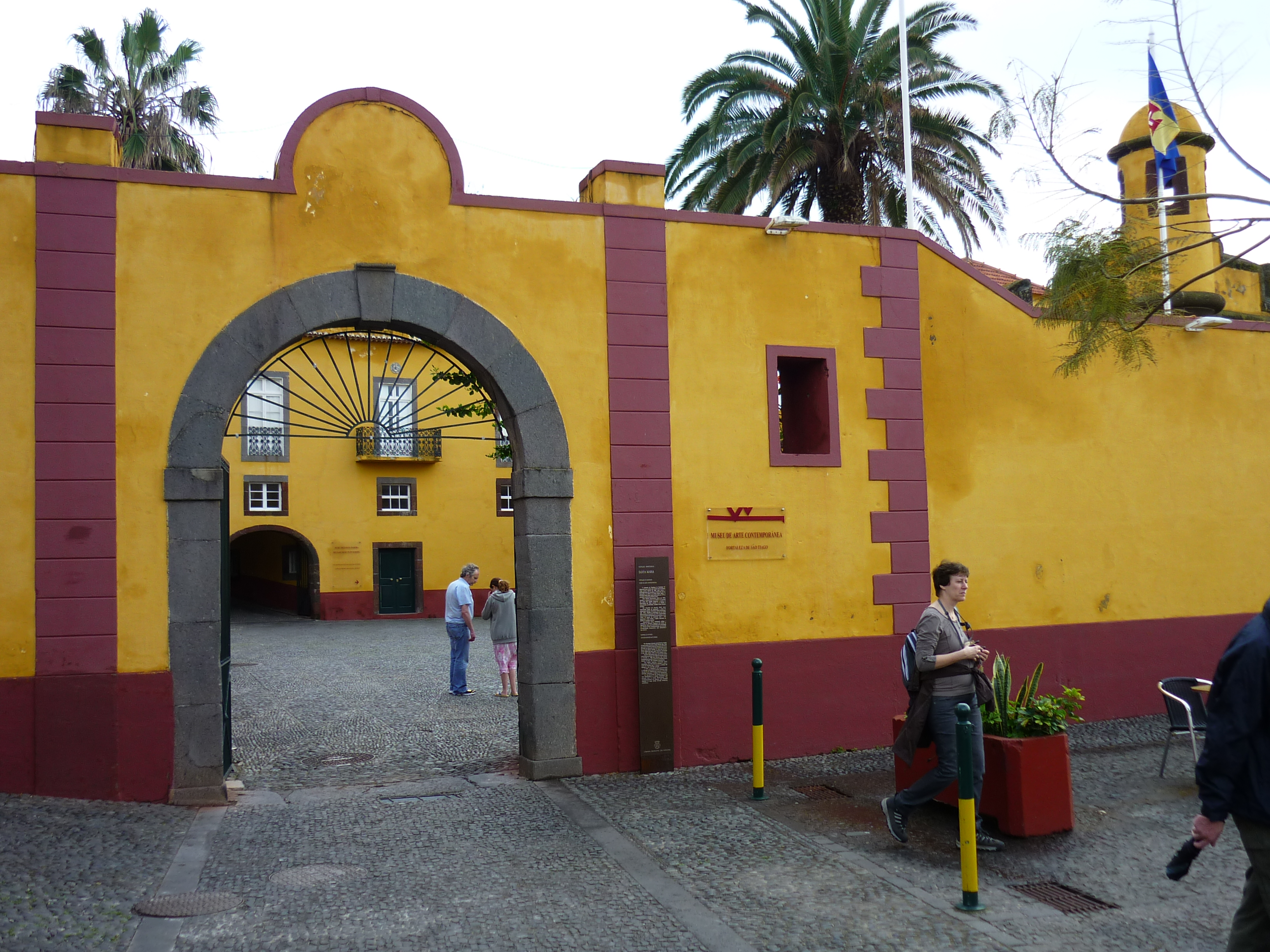 A Fortaleza de São Tiago erőd bejárata Funchalban (Madeira)